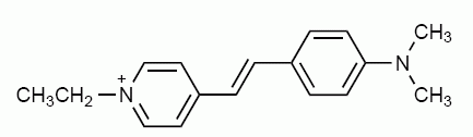 CyanineDye